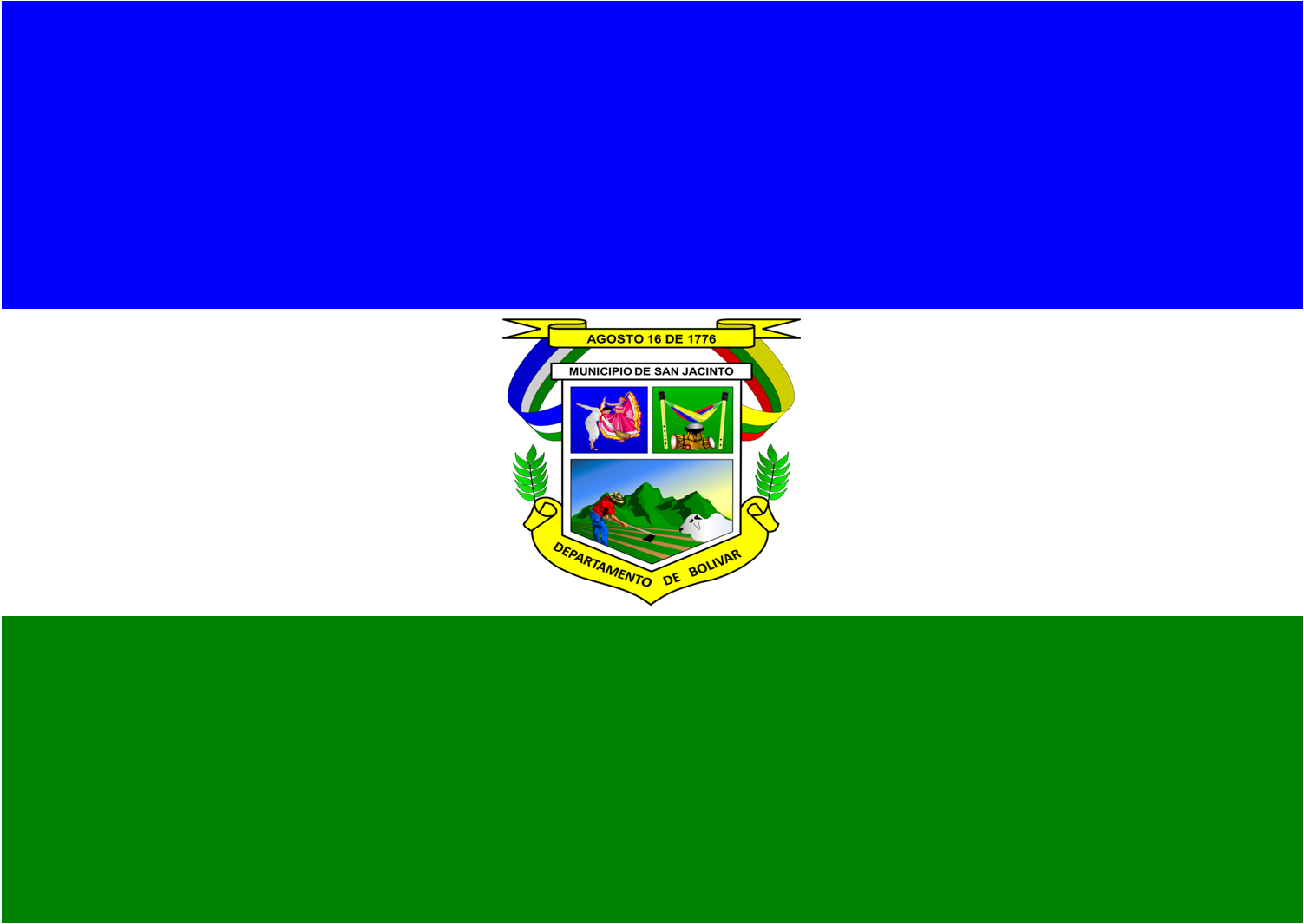 BANDERA DEL MUNICIPIO DE SAN JACINTO BOLIVAR